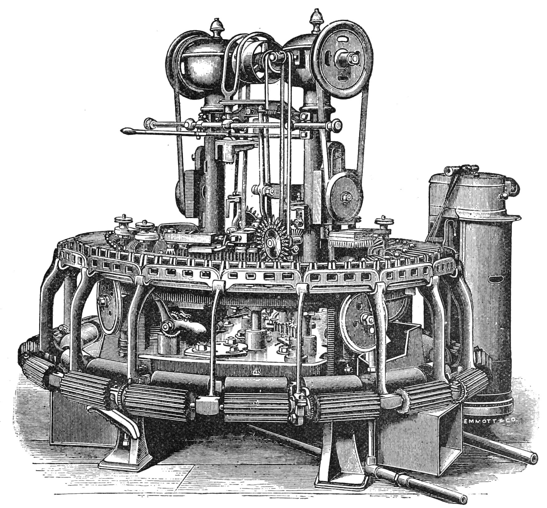 A noble comb